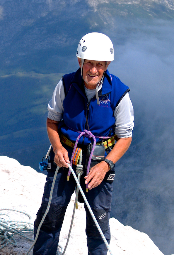 Pedro Udaondo en la cima del Picu Urriellu o Naranjo de Bulnes